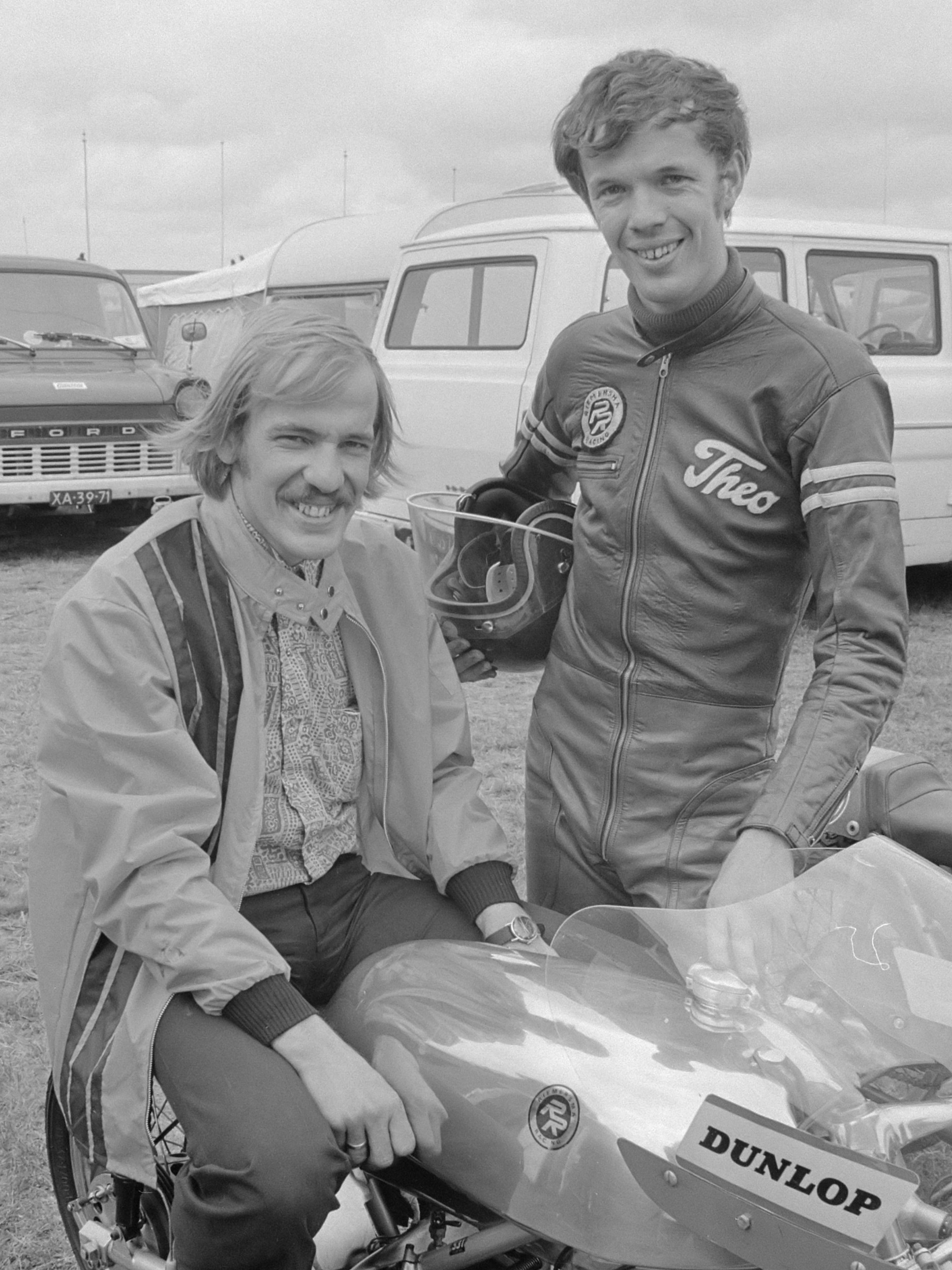 Rob Bron (l) en Theo Bult 23 juni 1971